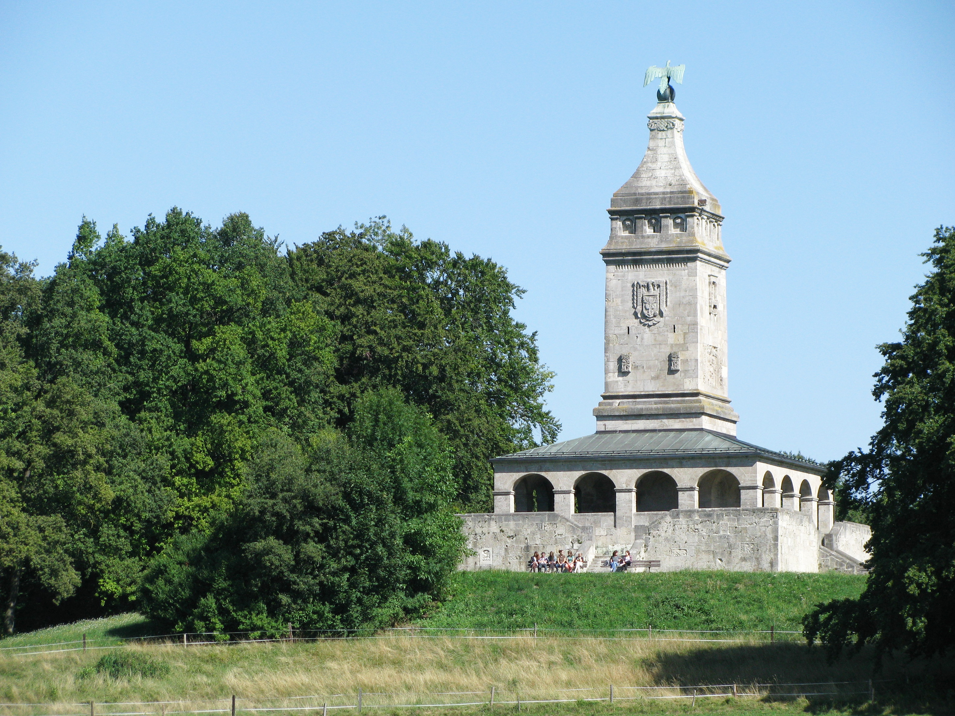 Bismarckturm bei Assenhausen